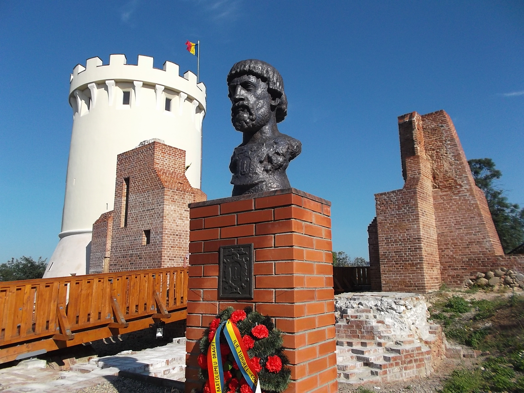 Ruinele cetății Károlyi